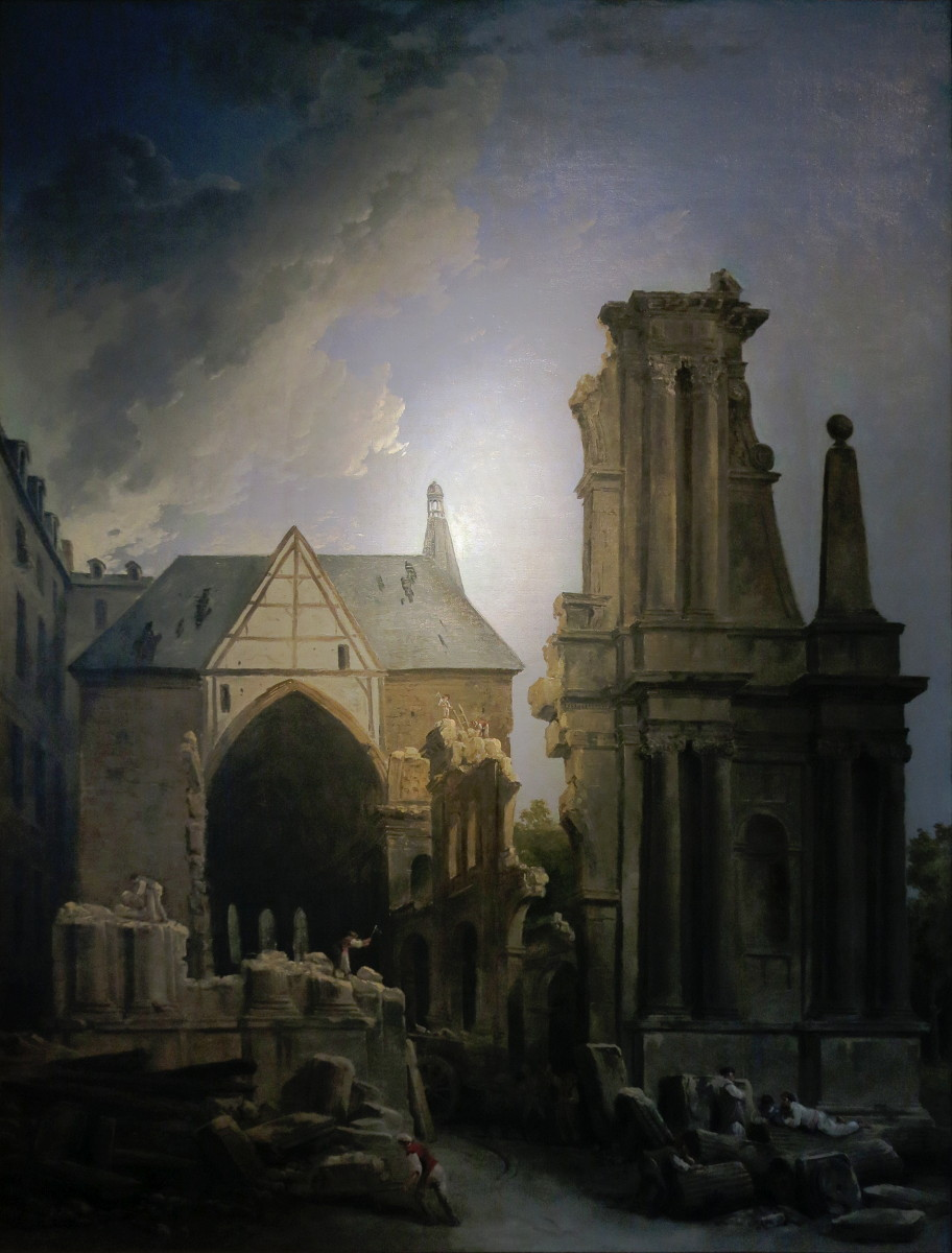 L'église des Feuillant (Paris) en démolitionDemolition of the Church of the Feuillantstitle QS:P1476,fr:"L'église des Feuillant (Paris) en démolition" label QS:Lfr,"L'église des Feuillant (Paris) en démolition"